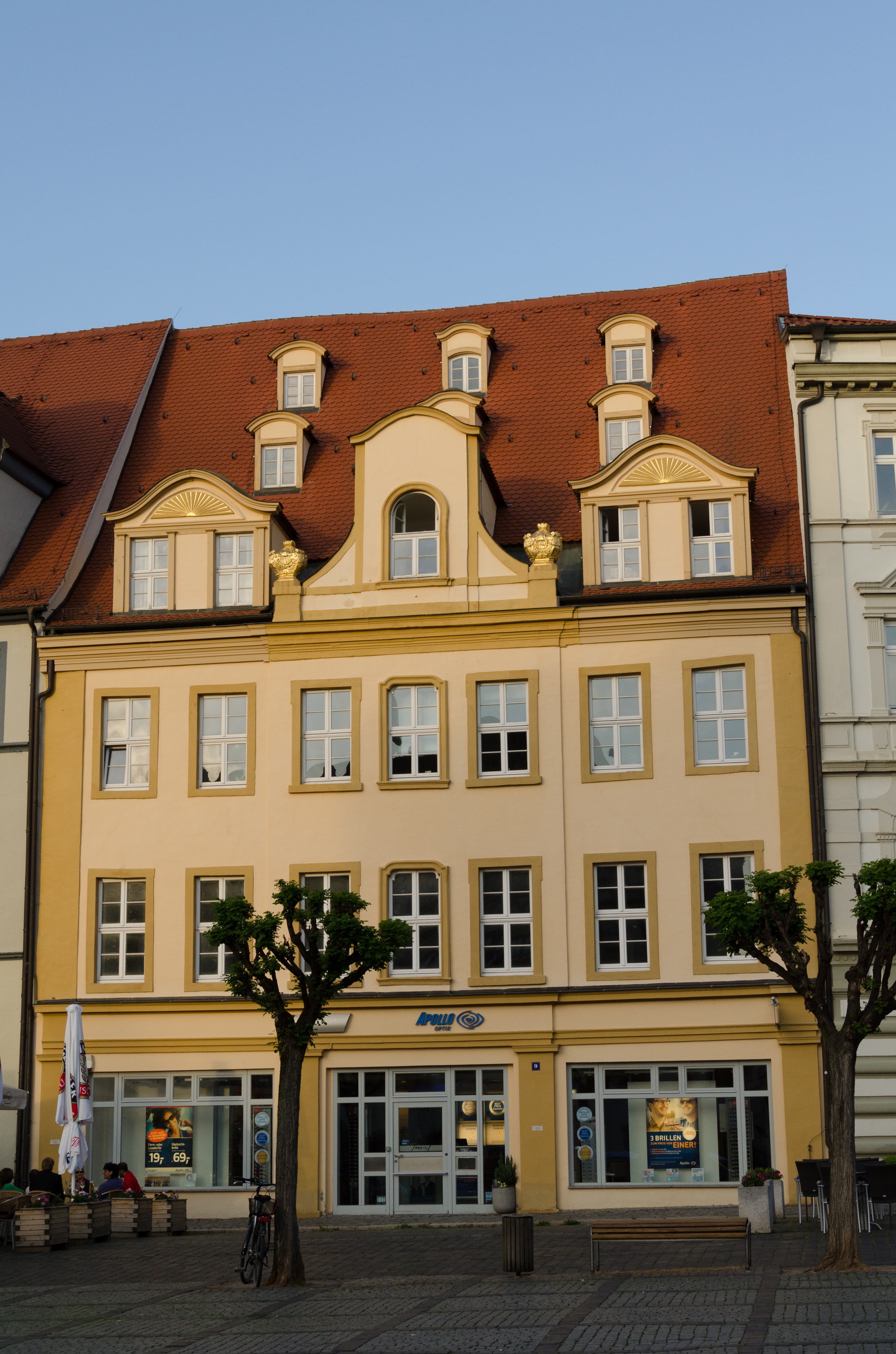 Naumburg, Markt 9